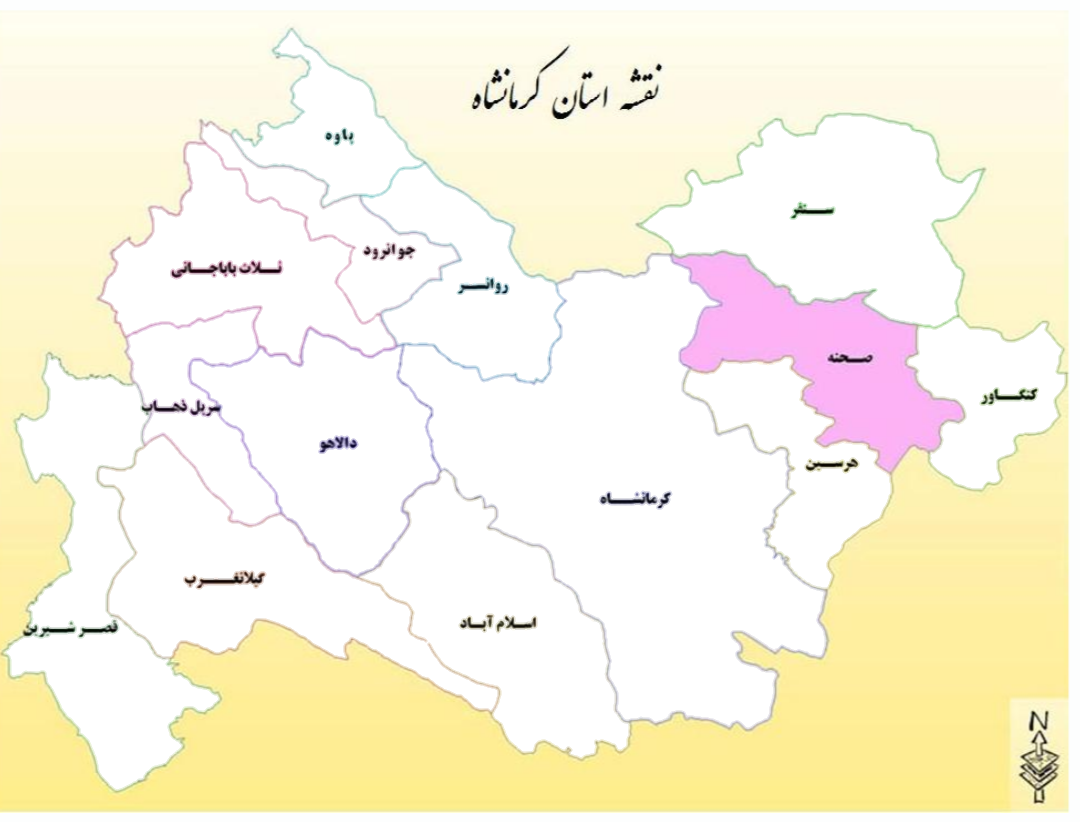 نقشه شهرستان صحنه در میانه نقشه استان کرمانشاه